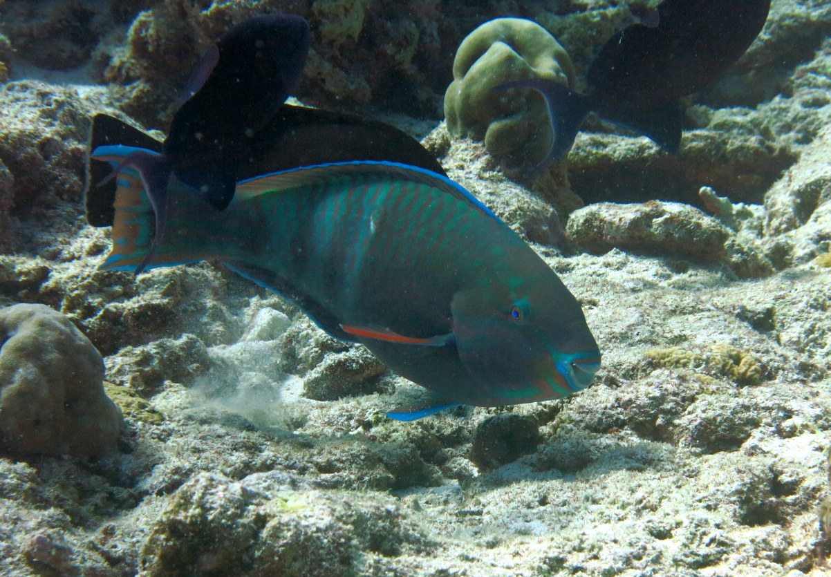 Un poisson-perroquet Scarus russelii en phase initiale (femelle) aux Maldives (atoll de Baa).